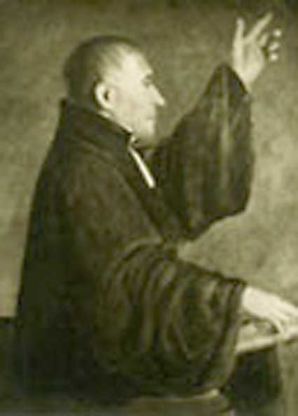 Wilhelm Lebrecht Götzinger (1758-1818) deutscher evangelischer Theologe